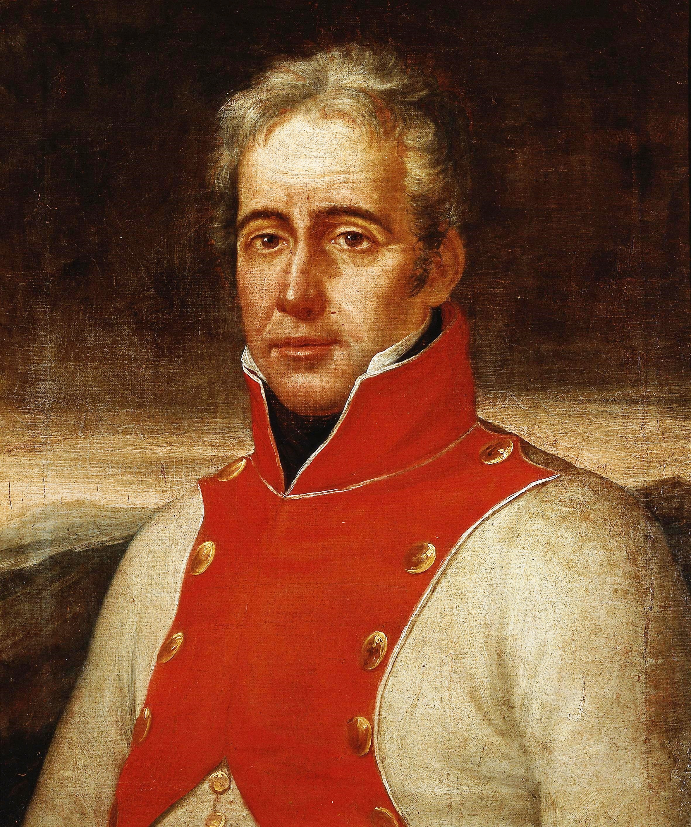 Retrato del militar y aristócrata español Pedro Agustín Girón (1778-1842), marqués de las Amarillas y primer duque de Ahumada.